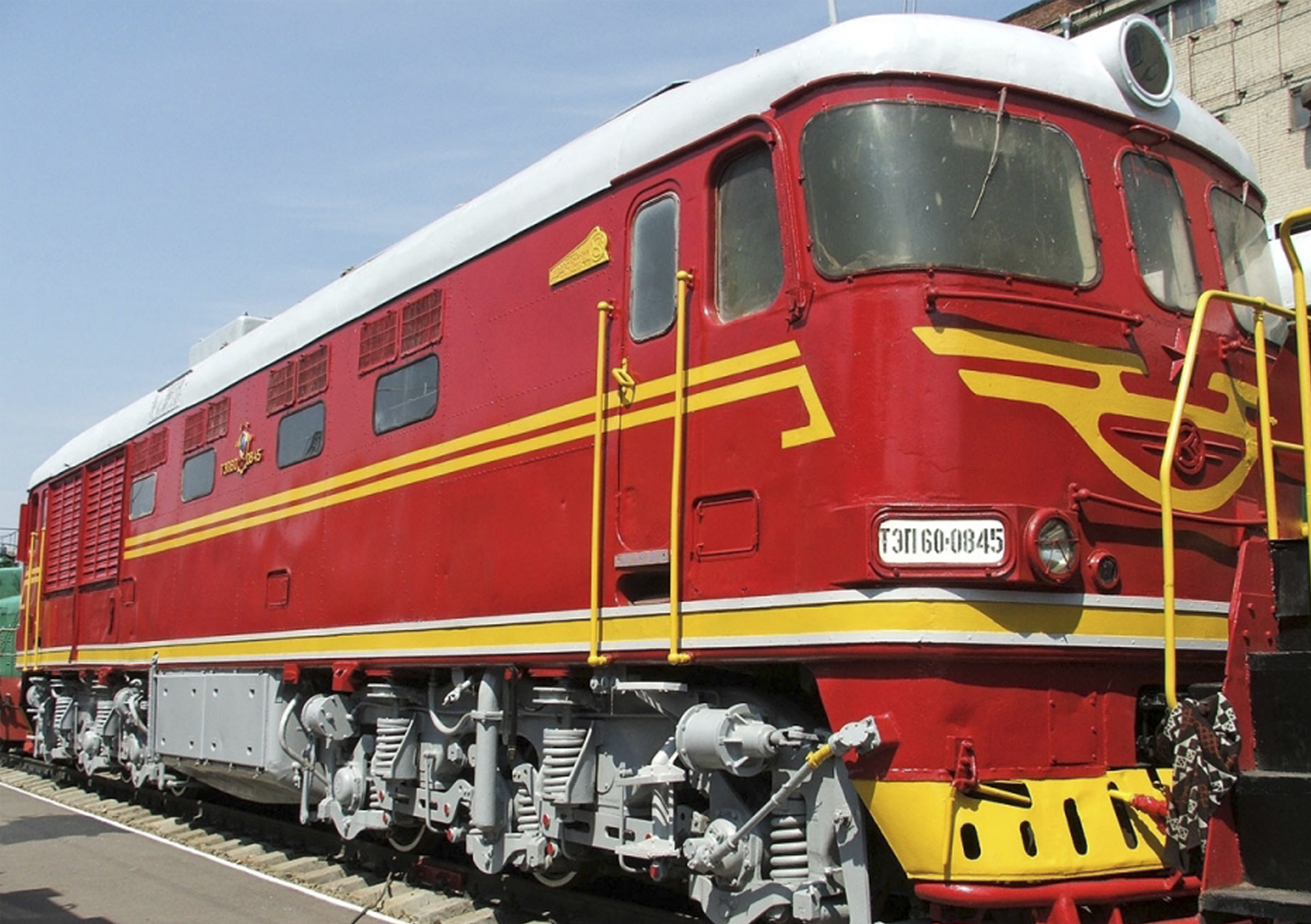 Тепловоз построен в 1978 году Коломенский тепловозостроительным заводом